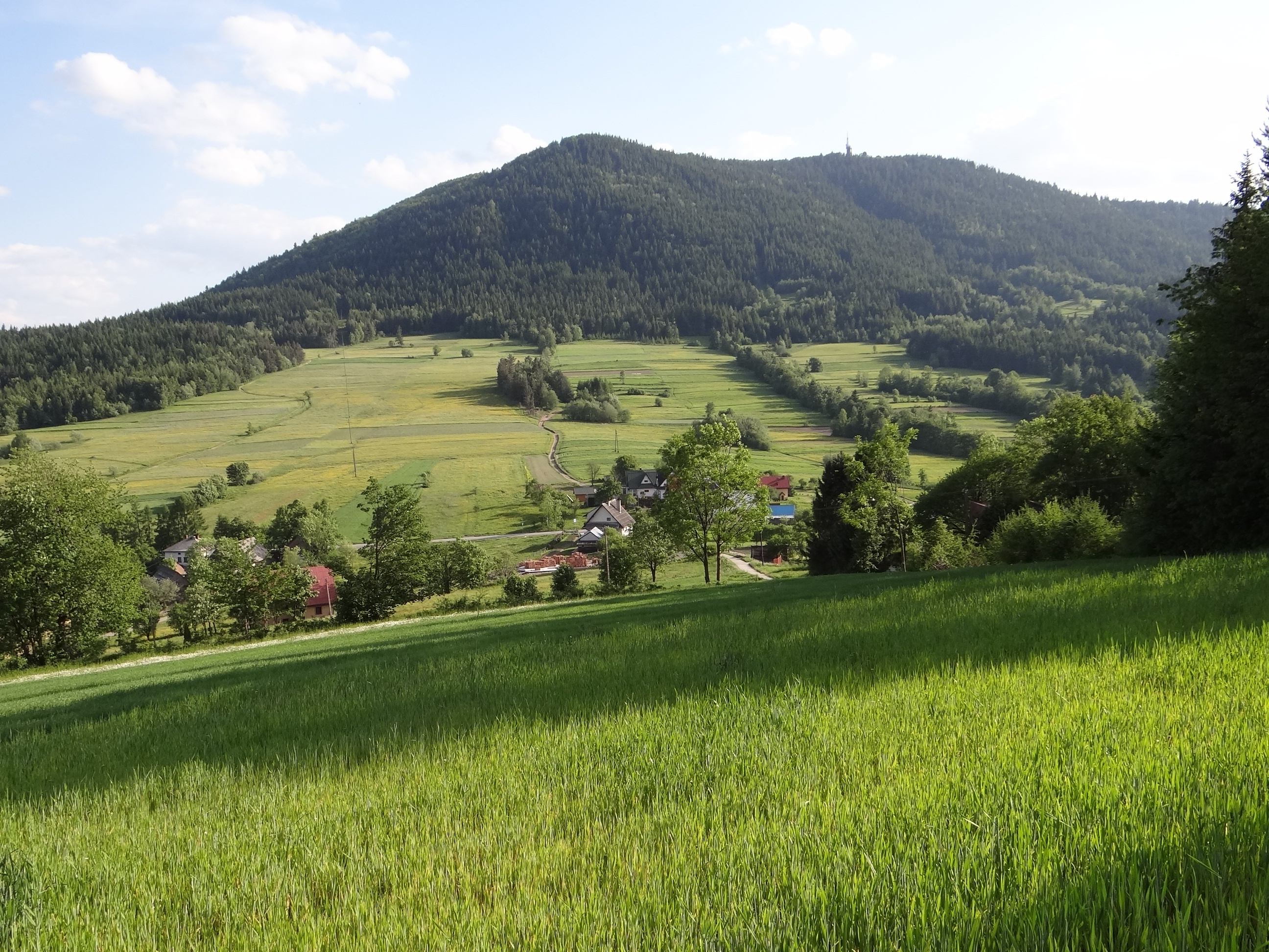 Luboń Wielki i przełęcz Glisne, widok ze zboczy Szczebla